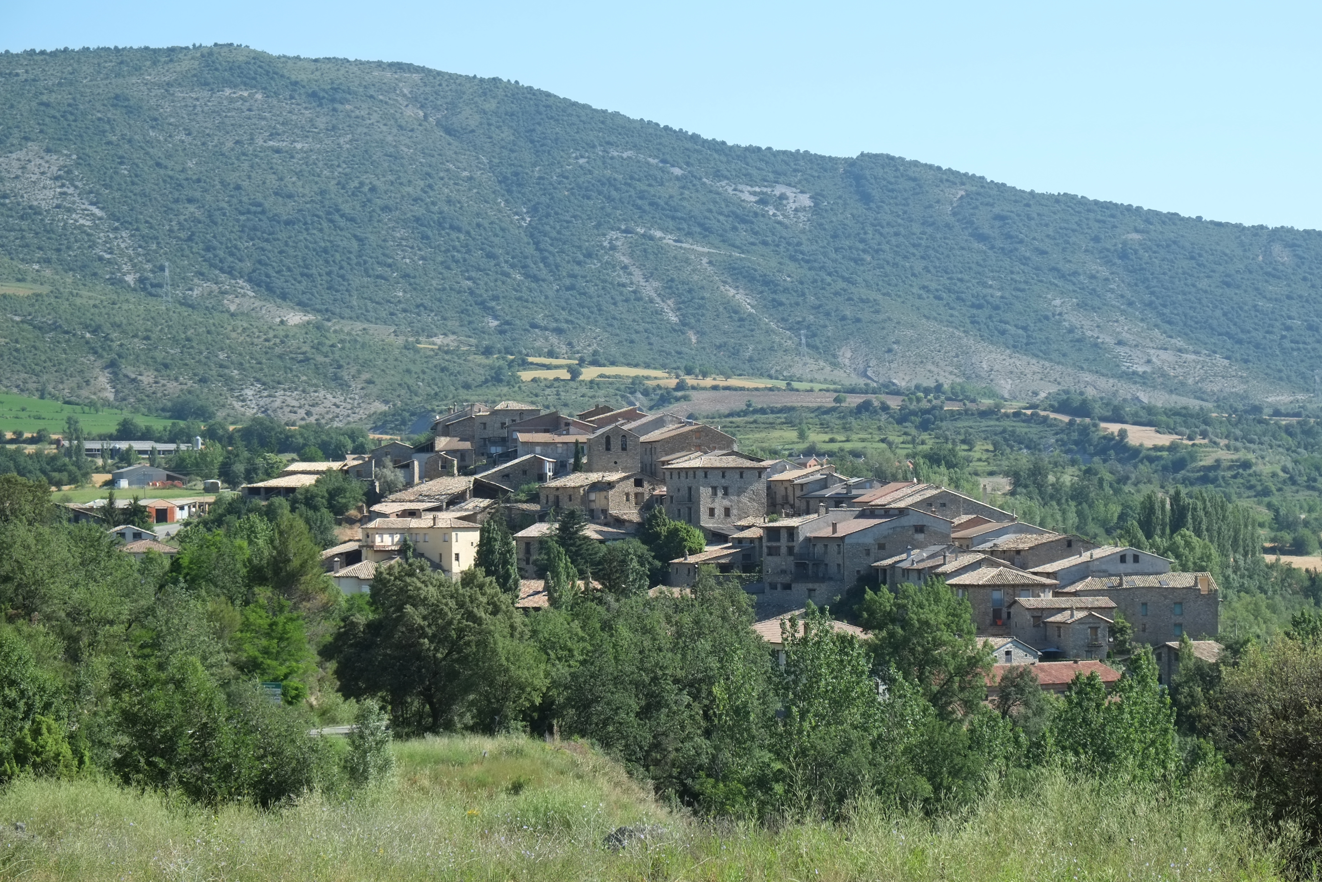 Kirche in La Puebla de Roda in Aragonien (Spanien)